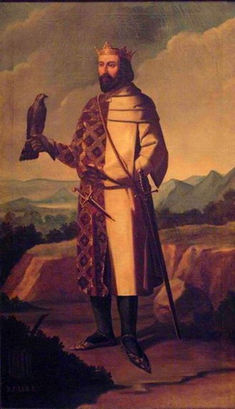 Retrato imaginario del rey Juan I de Aragón (1350-1396), que fue hijo del rey Pedro IV de Aragón y de la reina Constanza de Sicilia.